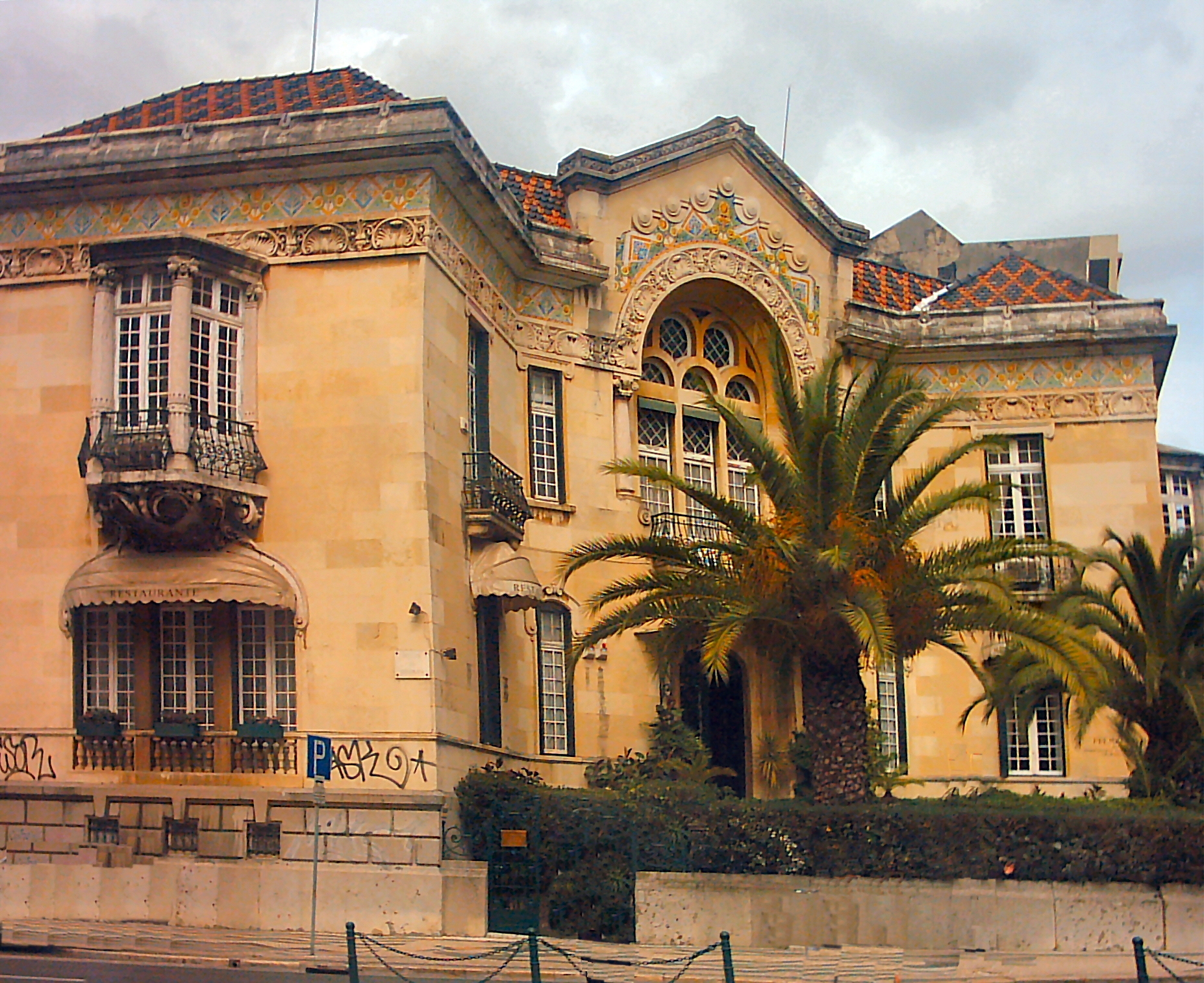 Antiga Mansão dos Viscondes de Valmor em Lisboa.